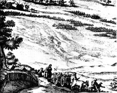 Srbi beže pred Turcima, sklanjajući se u Beograd 1690. godine (gravira J.B. Gumpa, detalj)